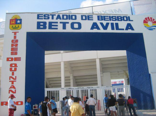 Estadio Beto Ávila in Cancún, Quintana Roo, Mexiko (Haupteingang)